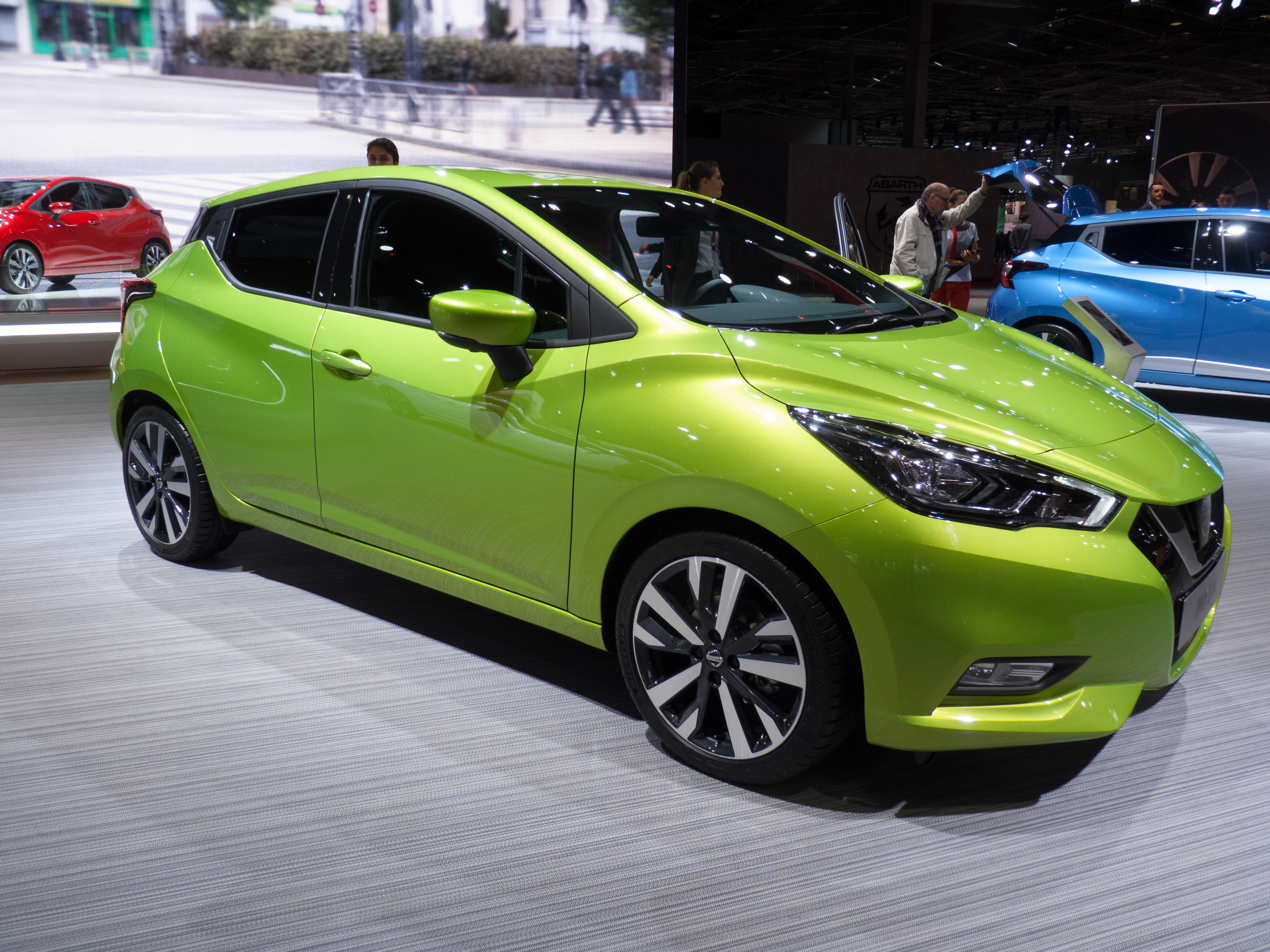 Nissan Micra au Mondial de l'automobile de Paris 2016